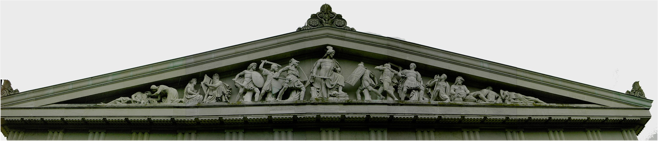 Giebelfries der Nordseite der Walhalla. Es zeigt links die Germanen unter Arminius in der Schlacht im Teutoburger Wald gegen die von Westen (rechts) anstürmenden Römer. Andere Versionen